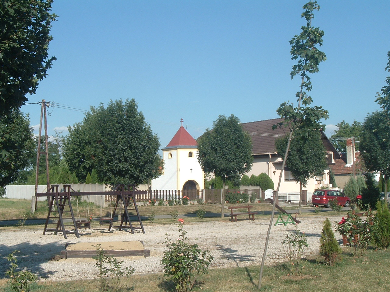 Iklanberény, Hungary